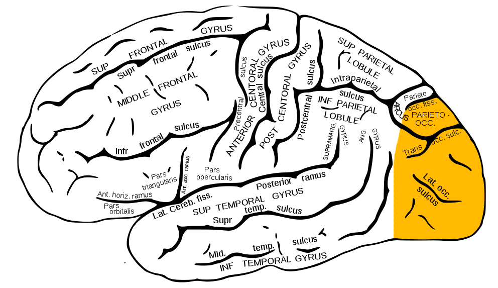 Occipital lobe.